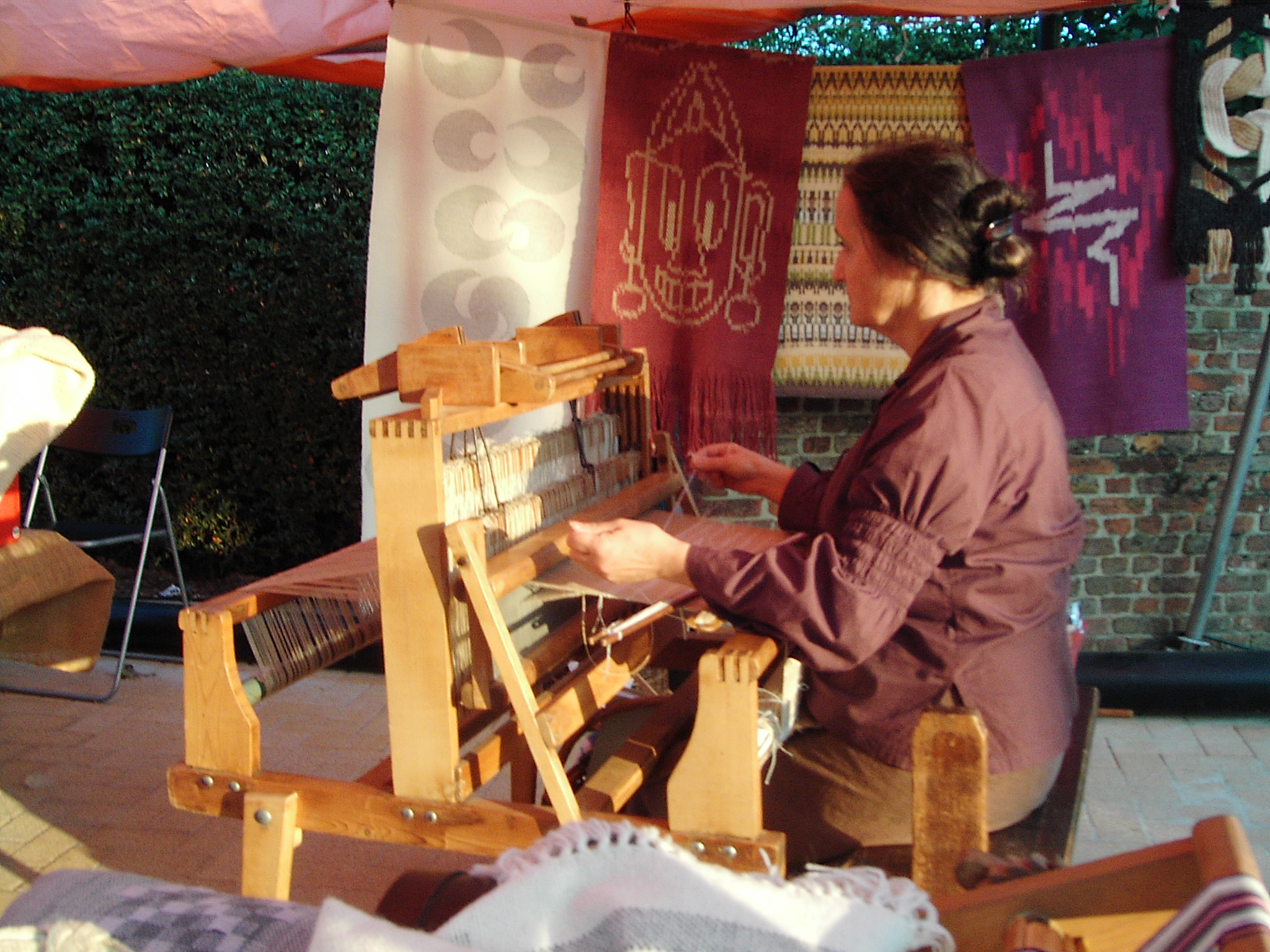 Eigen foto en laatste, zie Heffen en Pompoendag